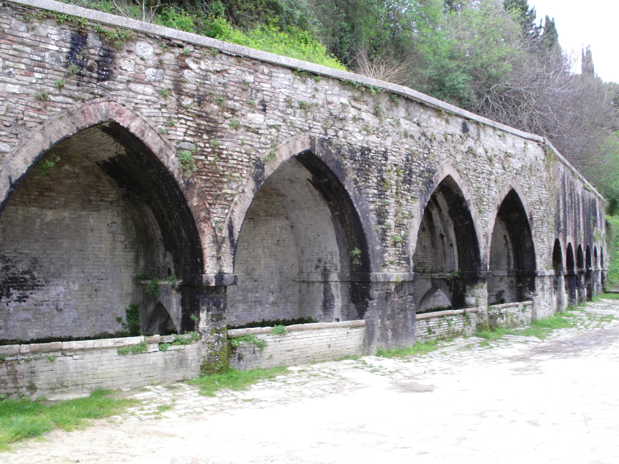 San Gimignano le Fonti